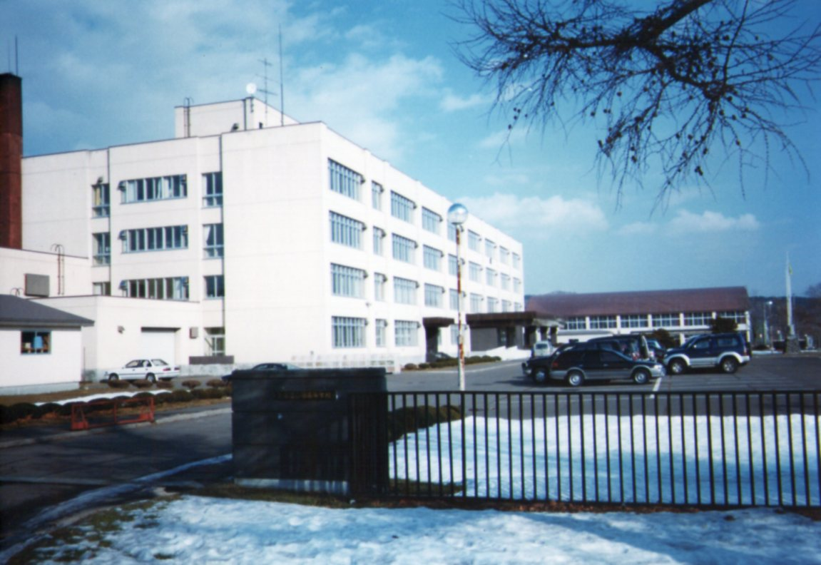 校舎を撮影。